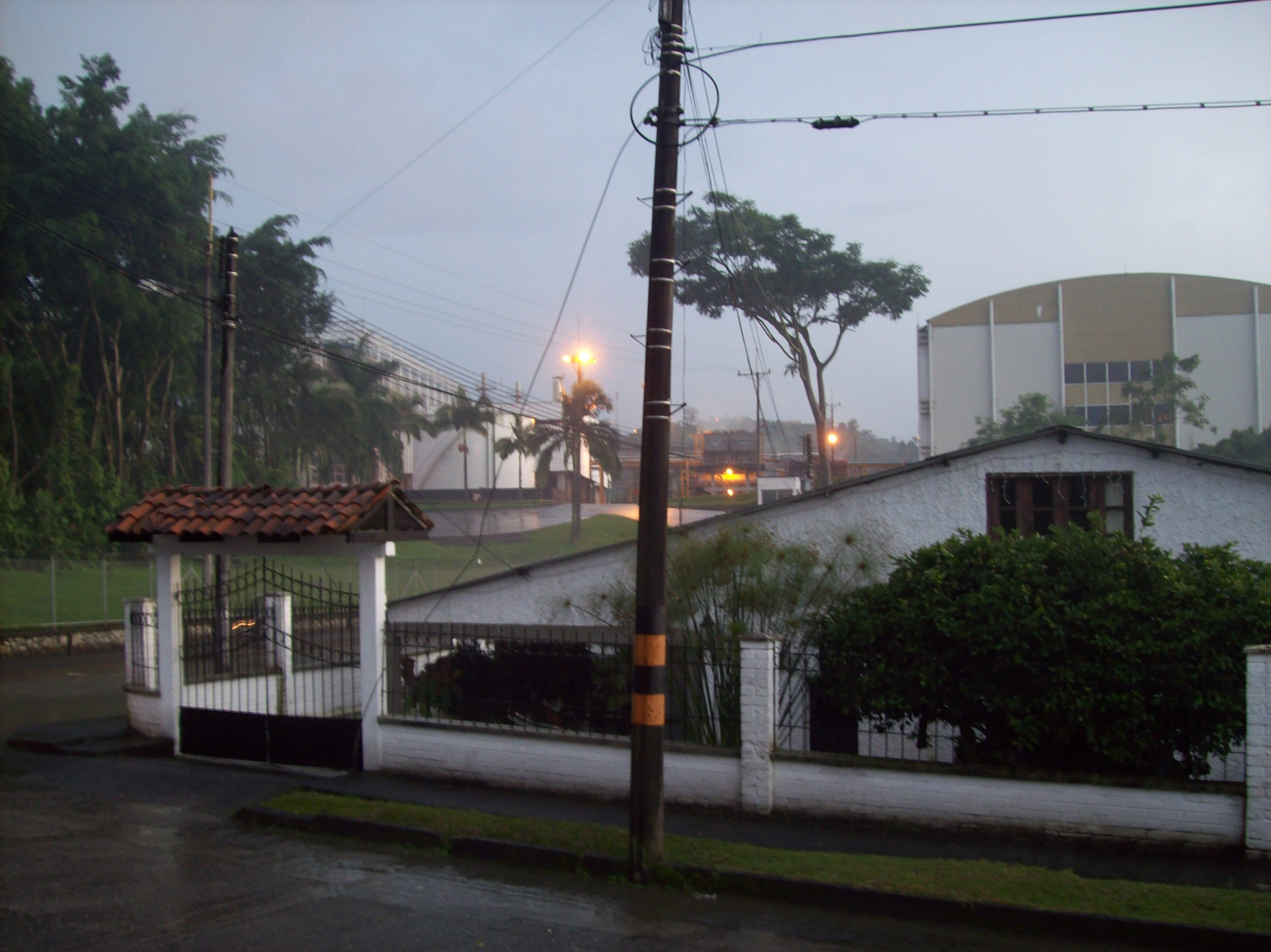 Vista de la fábrica Buencafé desde su lado suroccidente, en Chinchiná, Caldas, Colombia